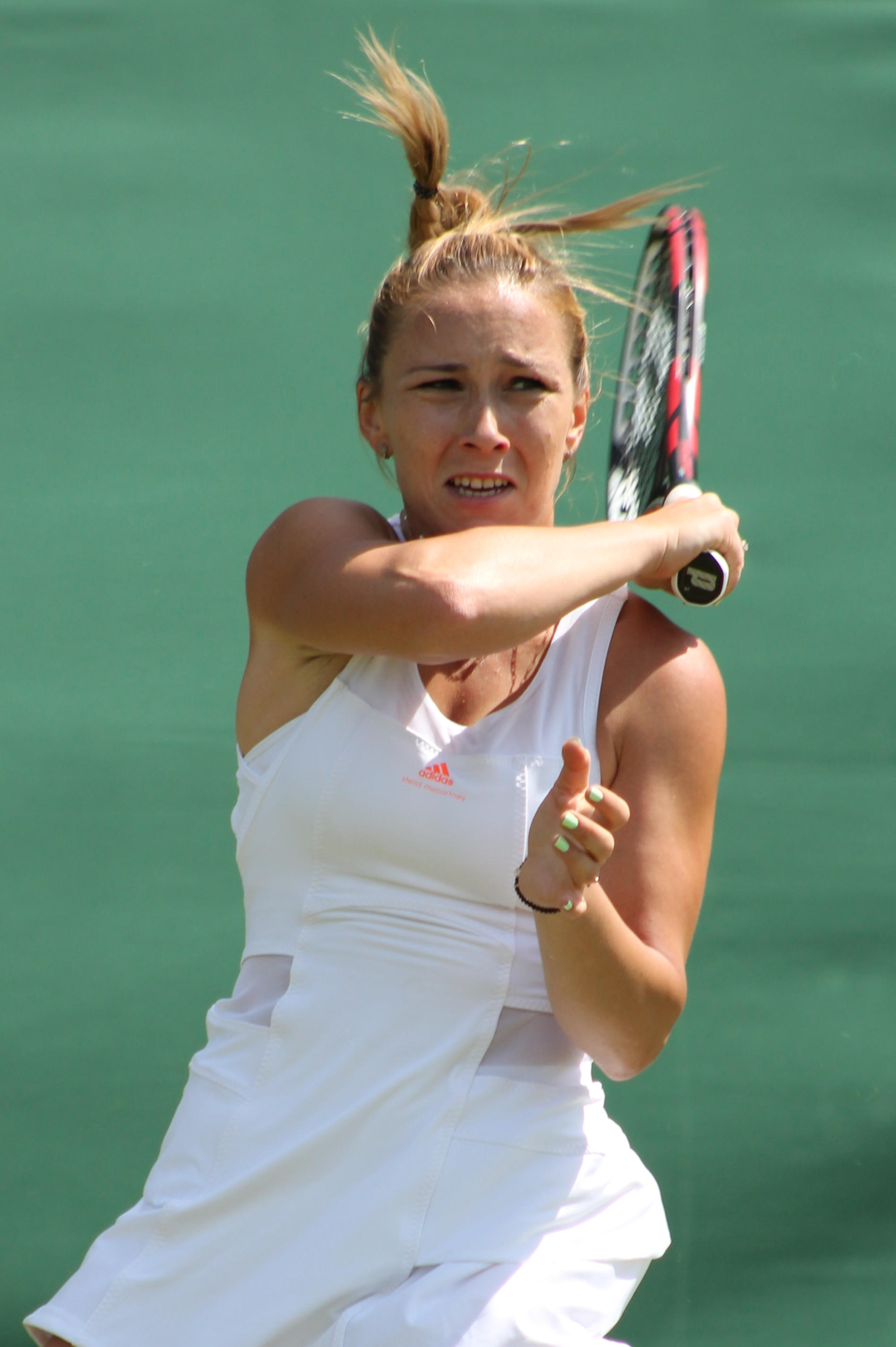 Shapatava WMQ14 (7)